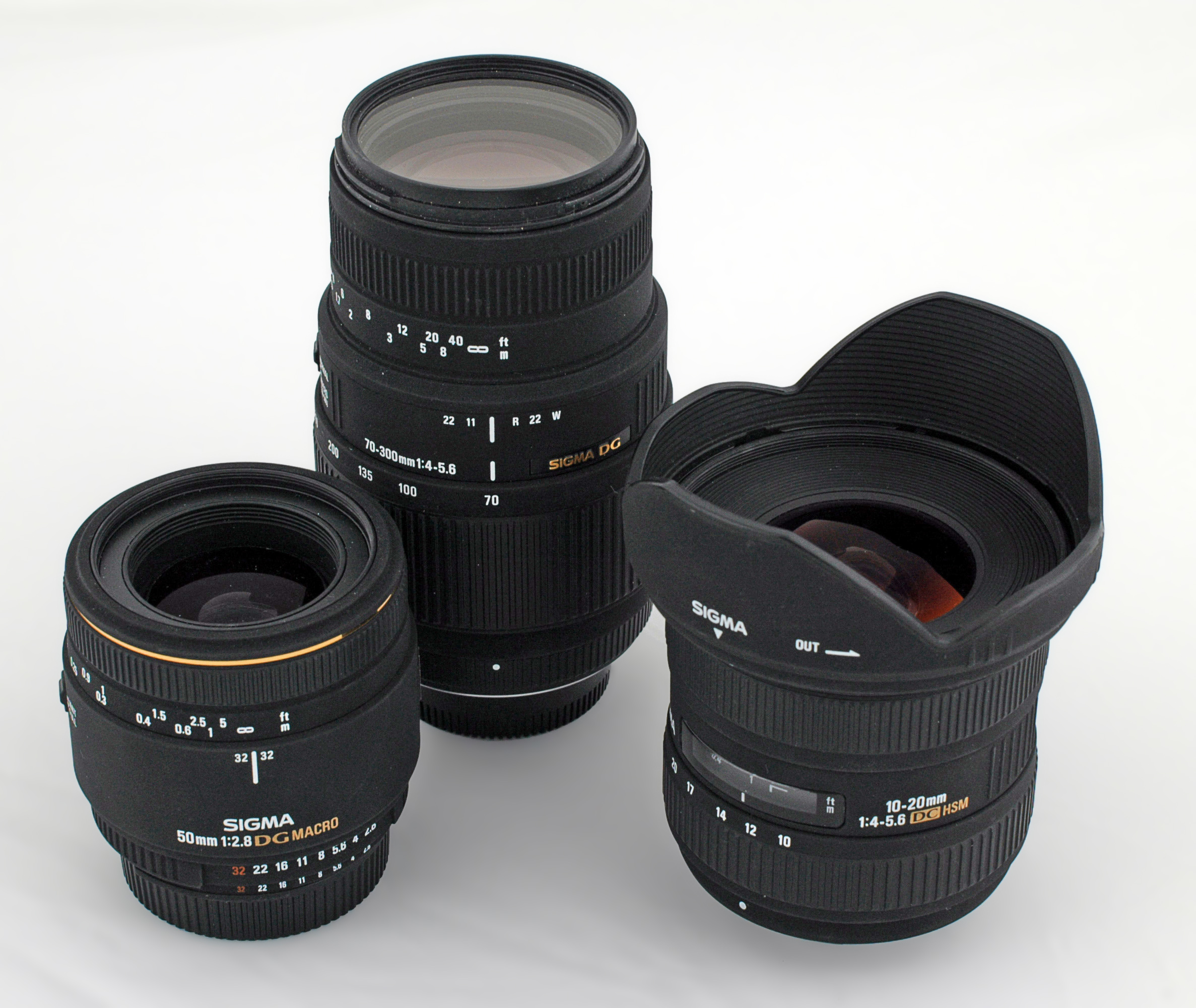 8. Fotoworkshop Nürnberg; 3 verschiedene Objektive von Sigma